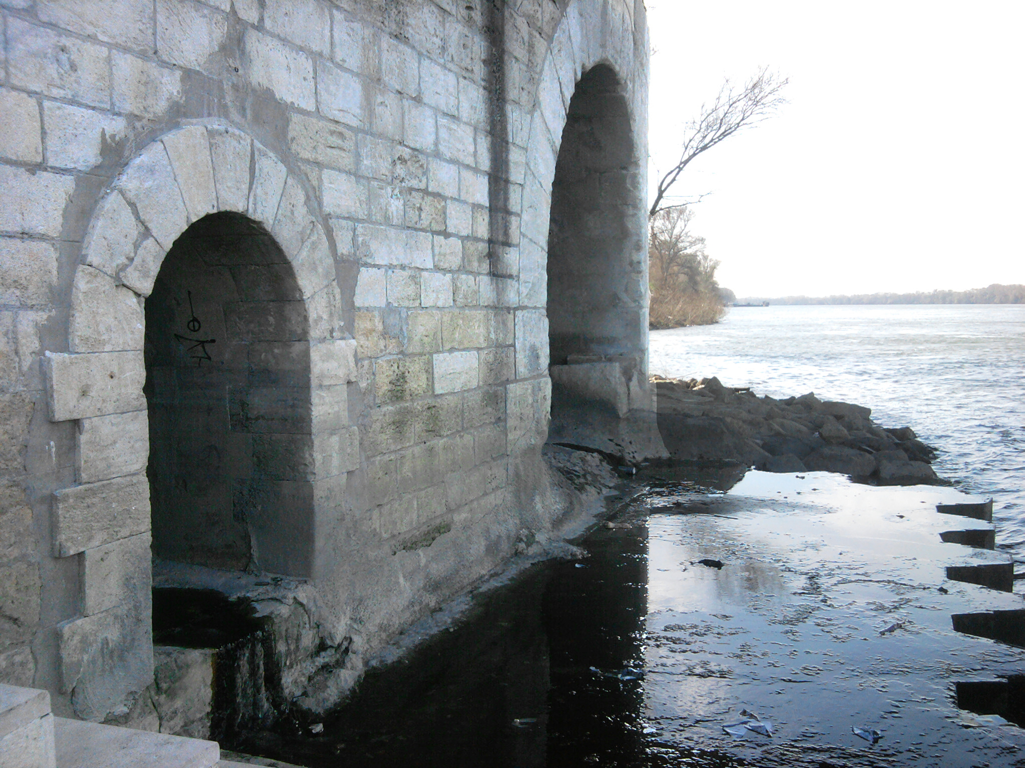 Embouchure du canal de Craponne à son arrivée dans le Rhône, à Arles (Bouches-du-Rhône).